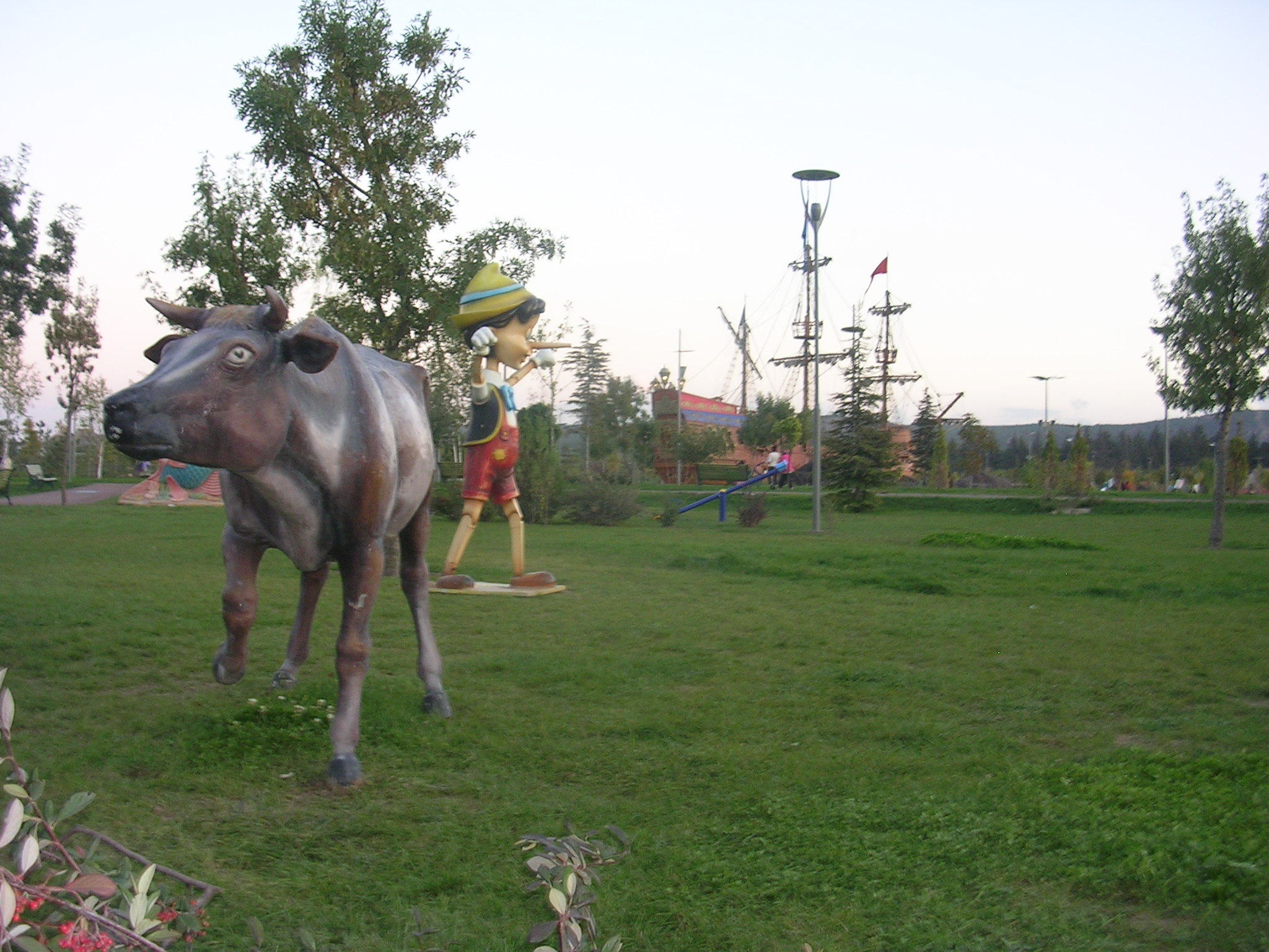 Eskişehir Bilim, Sanat ve Kültür Parkı.